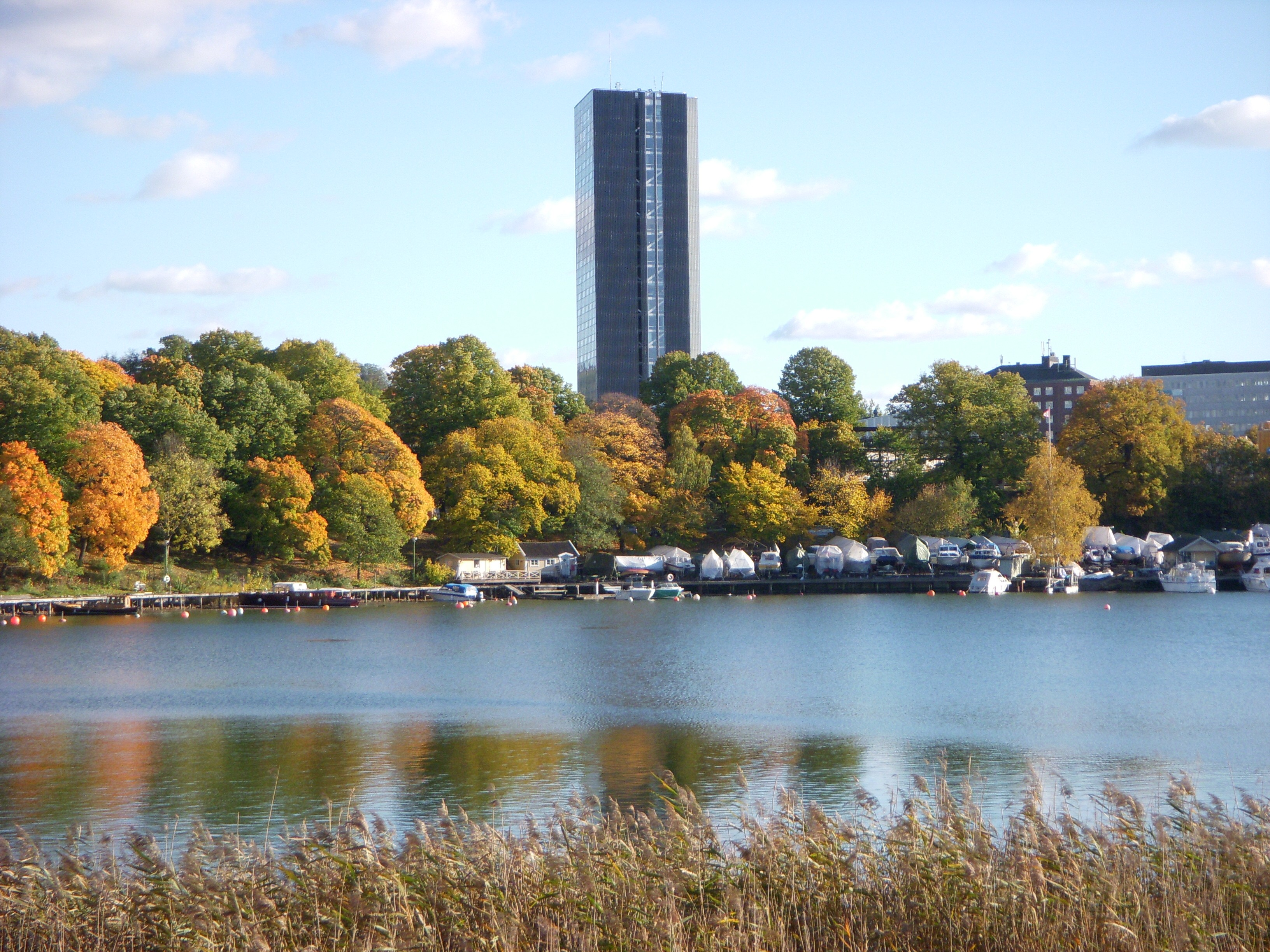 Wenner-Gren Center i Stockholm med Brunnsviken i föregrunden